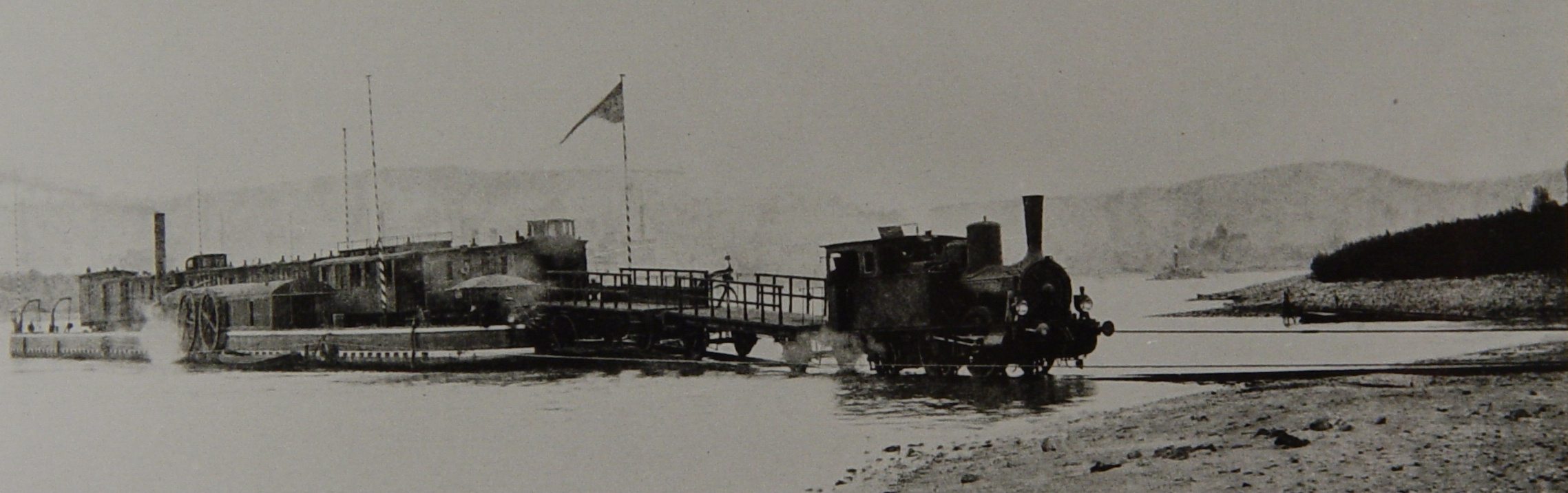 Ponte im Fährhafen Bonn um 1900.